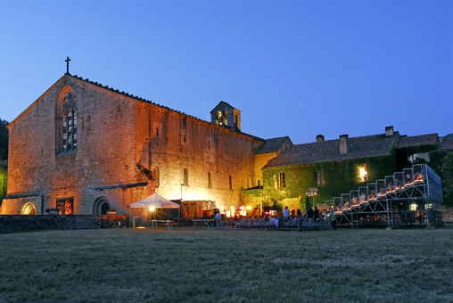 Scène extérieure lors du festival Musiques Sacrées - Musiques du Monde